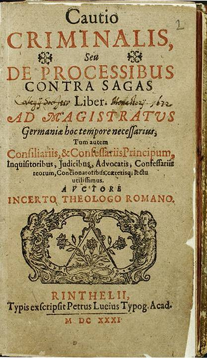 Cautio criminalis, Seu De processibus contra sagas liber. Ad magistratus Germaniae hoc tempore necessarius, tum autem Consiliariis, & Confessariis Principum, Inquisitoribus, Judicibus, Advocatis, Confessariis reorum, Concionatoribus, caeterisq; lectu utilissimus. Auctore Incerto theologo Romano. Rinthelii, Typis exscripsit Petrus Lucius Typog. Acad. M DC XXXI Stadtbibliothek Trier